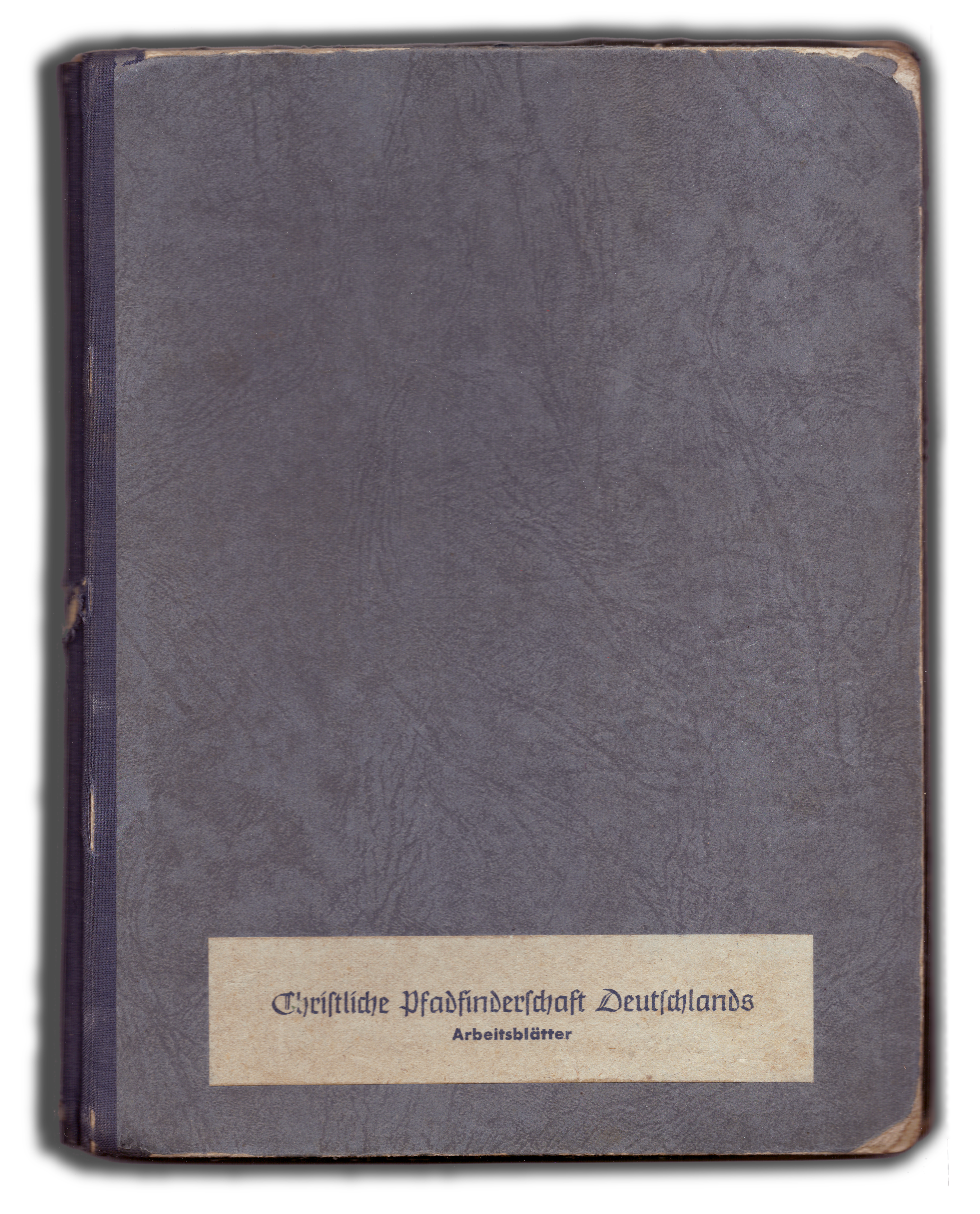 Christliche Pfadfinderschaft Deutschlands – Arbeitsblätter; Schnellhefter, späte 1940er Jahre. In dem Schnellhefter, der von der 1947 in Landshut gegründeten Siedlung Wilhelm Löhe im Gau Isar angeschafft wurde und dann in die Hände der Siedlung Franz von Assisi ging, befinden sich teilweise noch in Fraktur gesetzte religiöse, pfadfinderorganisatorische und -erzieherische Blätter. Dazu gibt es Arbeitsblätter zur Praxis. Die Siedlungs- bzw. Stammesnamen der ehemaligen Besitzer befinden sich auf der vorderen Innenseite des Einbandes. Etliche Blätter mit religiösem Inhalt – allesamt in Fraktur – stammen aus der Feder von Pfarrer Hermann Haaß. Das Arbeitsblatt mit Jahrgang II/1 widmet sich der Geschichte des Bundes bis 1948. Die Losung des Jahres 1949 ist noch abgedruckt. Im Arbeitsblatt, Jahrgang III - 1 ist die erste Nachkriegsbundesordnung nachzulesen. Die letzten Blätter stammen aus den frühen 1960er Jahren.